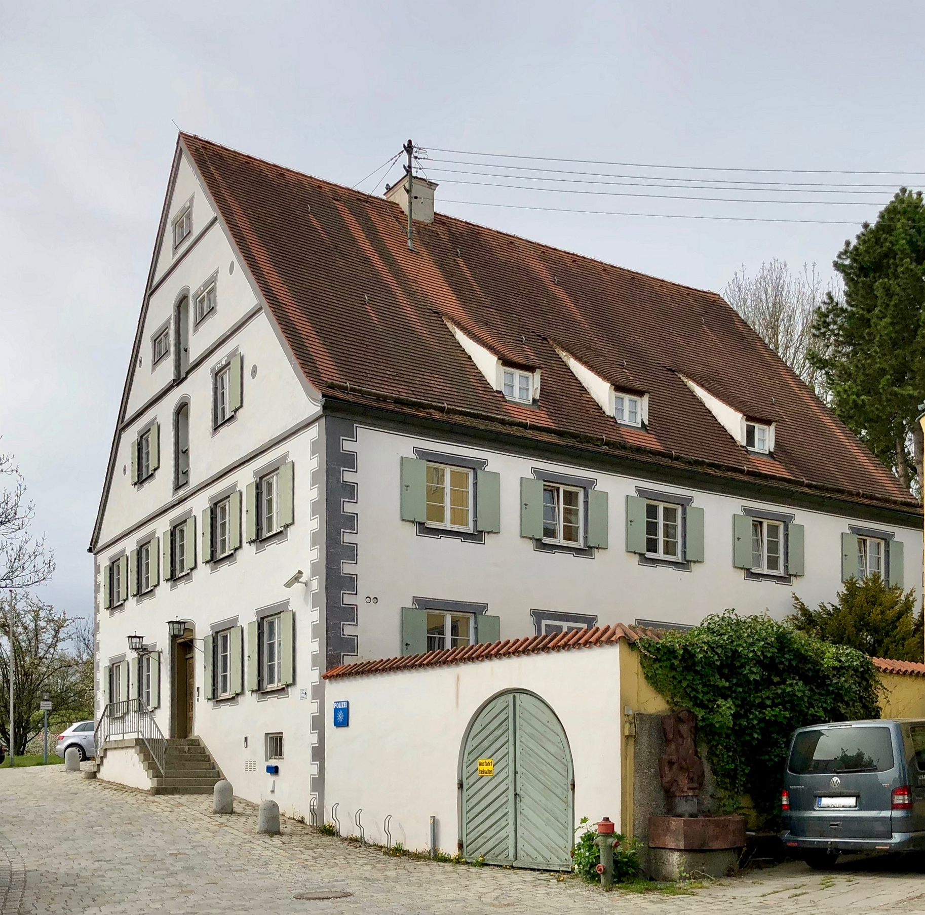 Ehemaliges Klosterrichterhaus, dann Forstamt, heute Polizeigebäude: stattlicher Steilsatteldachbau mit Aufzugsöffnungen und Putzgliederung, 1. Hälfte 18. Jahrhundert, Portal mit reichem Schnitzdekor, um 1879